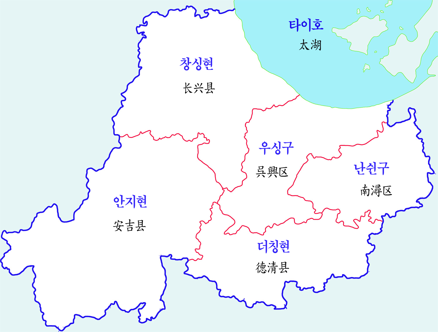 후저우시 행정구역